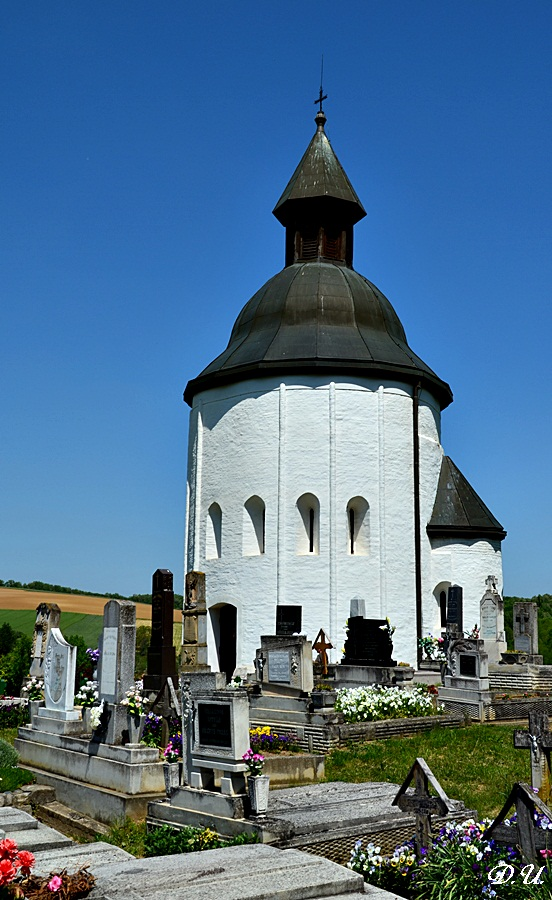 Kallosd in Ungarn